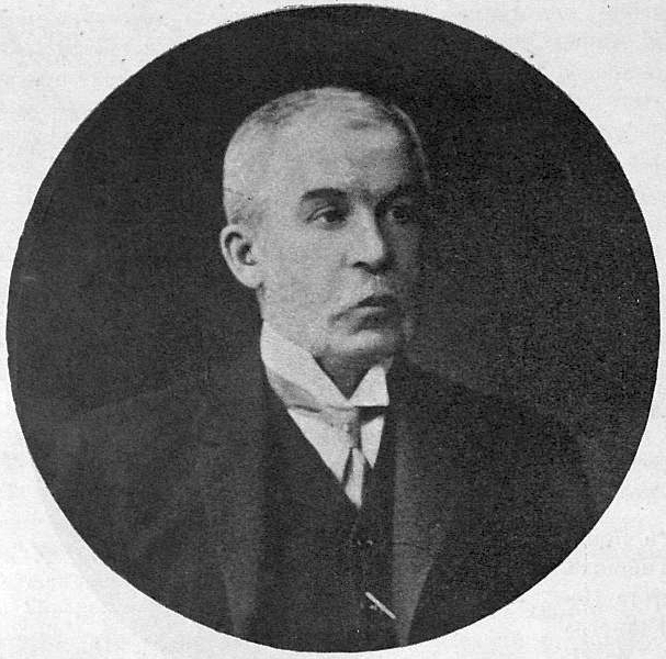 Пётр Николаевич Дурново